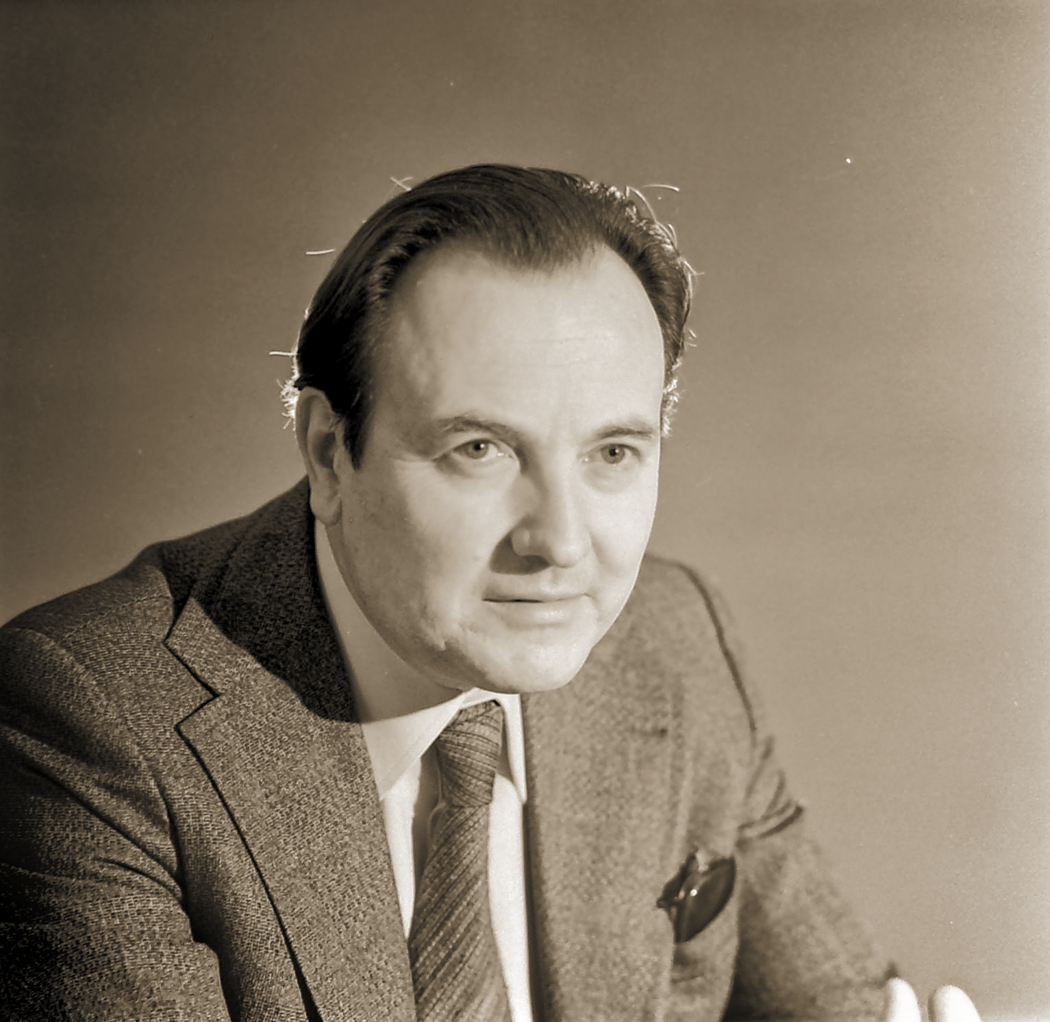 Aktor Ignacy Gogolewski, portret z okresu pracy w Lublinie. Reprodukcja analogowego negatywu formatu 6x6 cm.